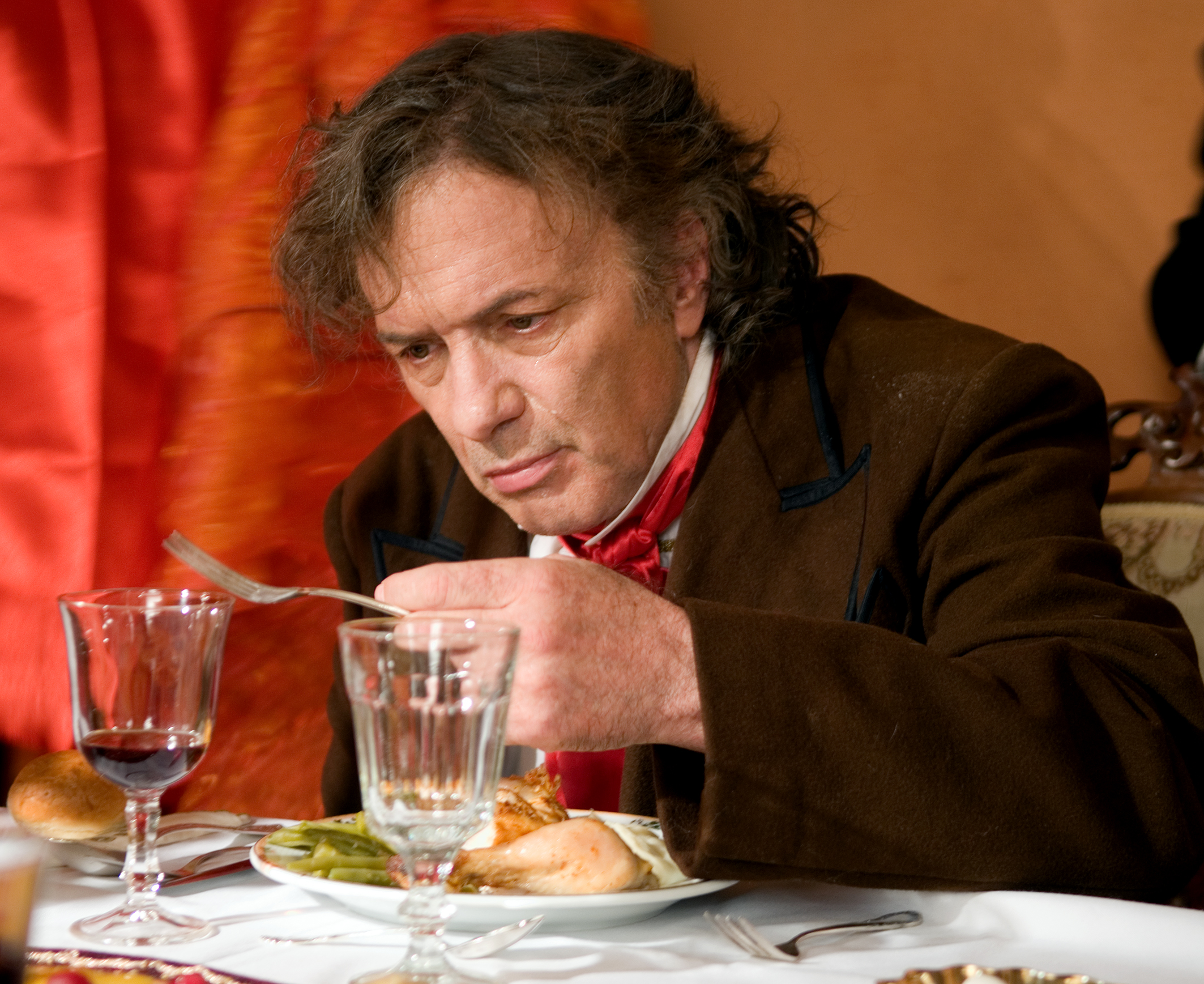 אסי דיין כבטהובן, בסרטו של ויקטור בראון "פיניטה לה קומדיה"